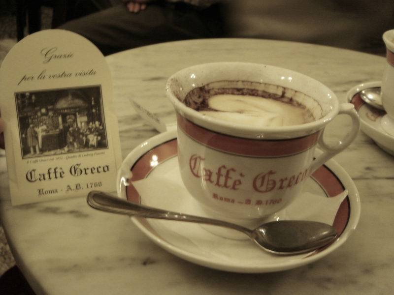 Antico Caffè Greco in Roma - Italy.